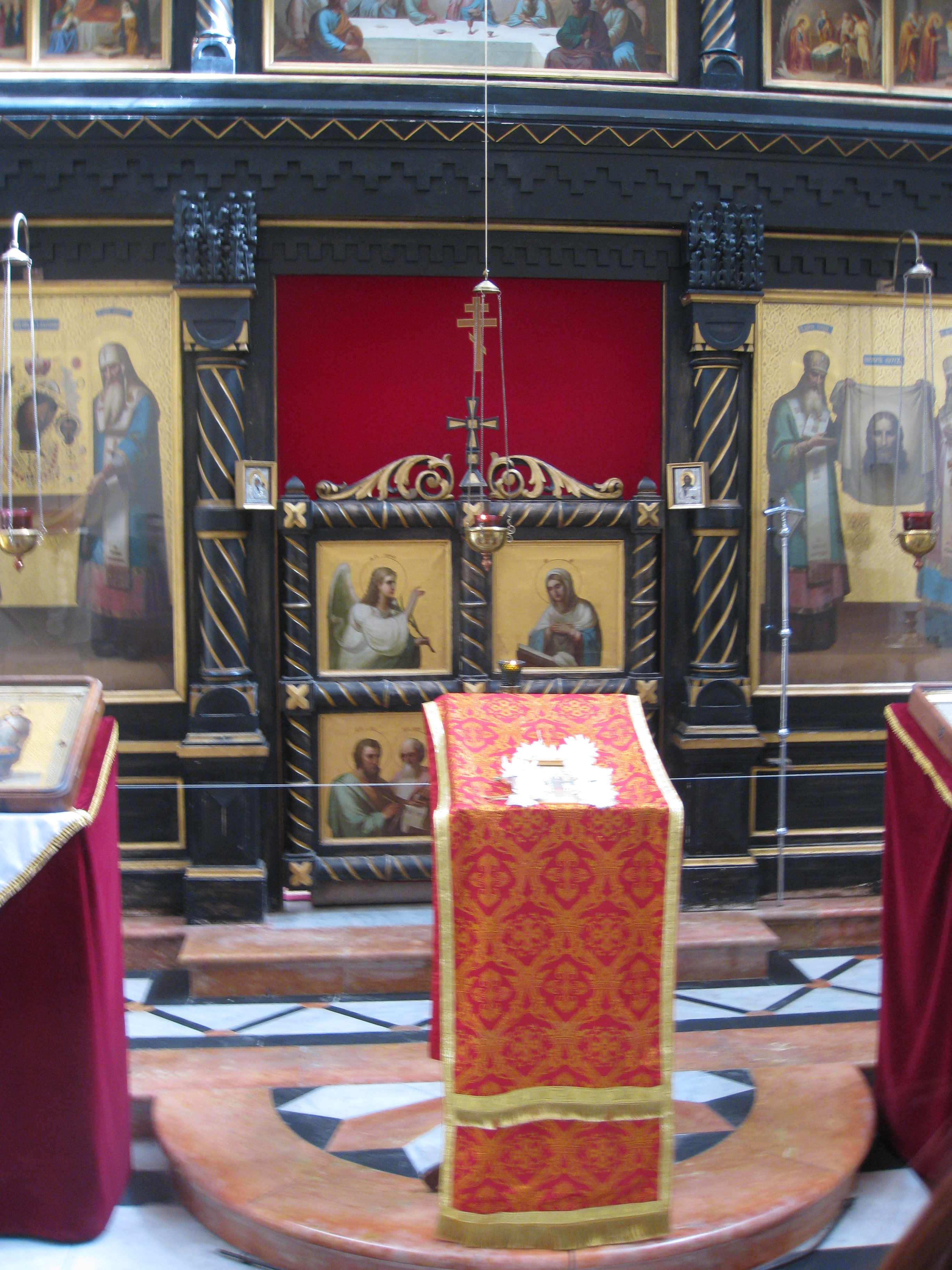 The Christian Quarter - The Russion Church הרובע הנוצרי בעיר העתיקה של ירושלים הכנסייה הרוסית